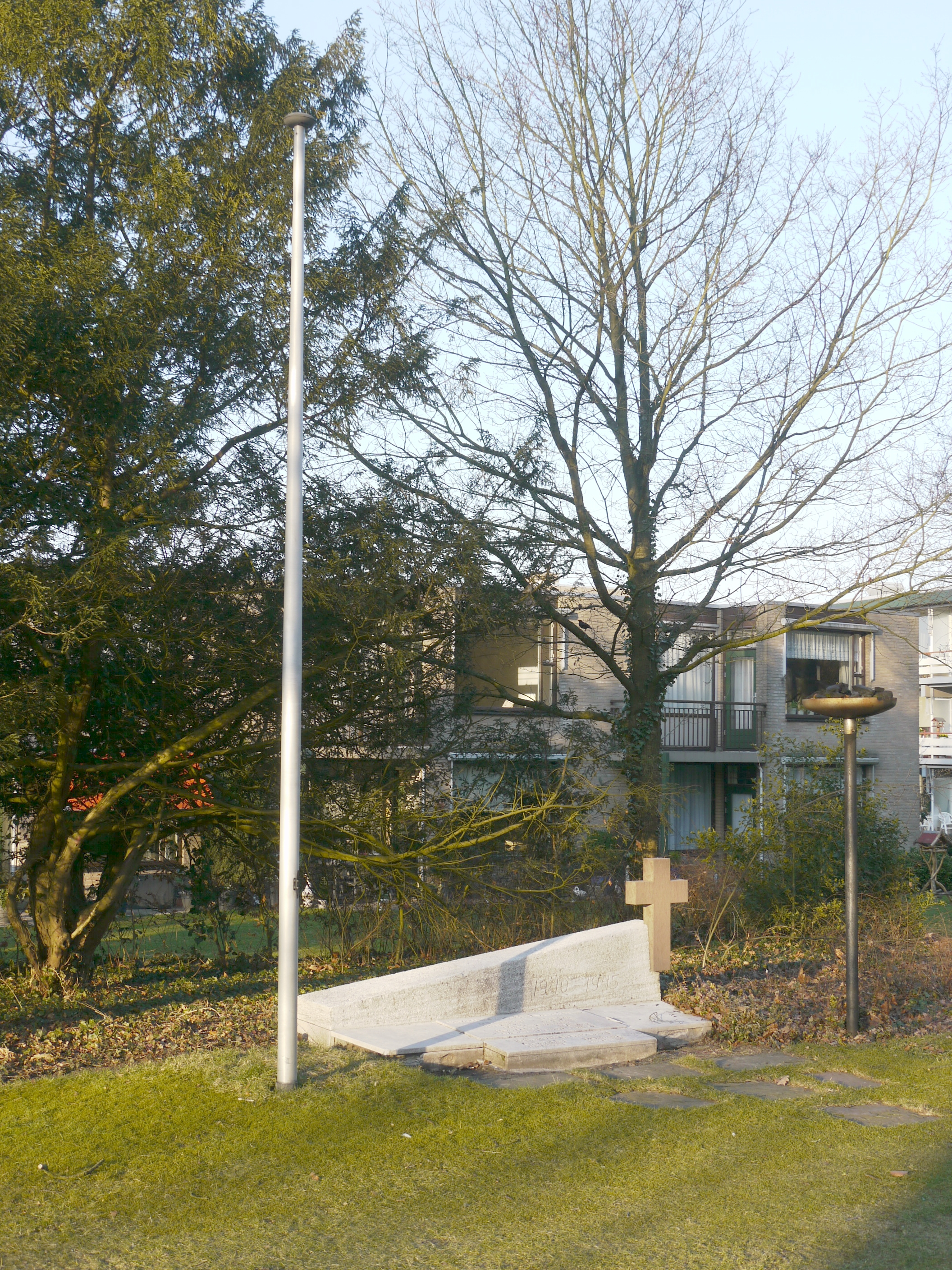 Verzetsmonument in Beekbergen. Onthuld op 4 mei 1970 door oud-verzetsman Jan van Beek.